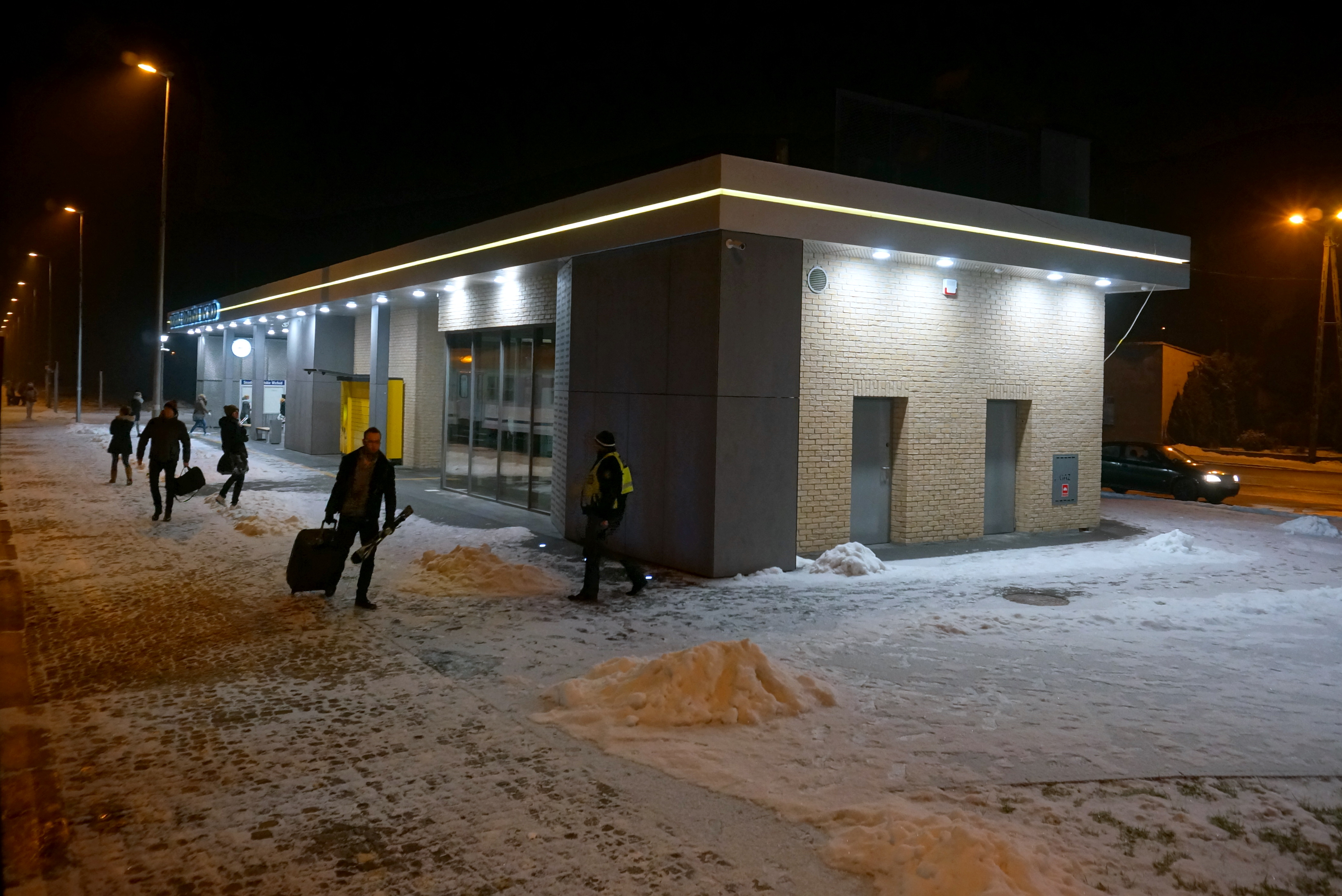 Strzelce Krajeńskie Wschód, stacja kolejowa w Zwierzynie. Budynek dworca wybudowany w ramach projektu Innowacyjnych Dworców Systemowych i oddany do użytkowania w 2015 r.